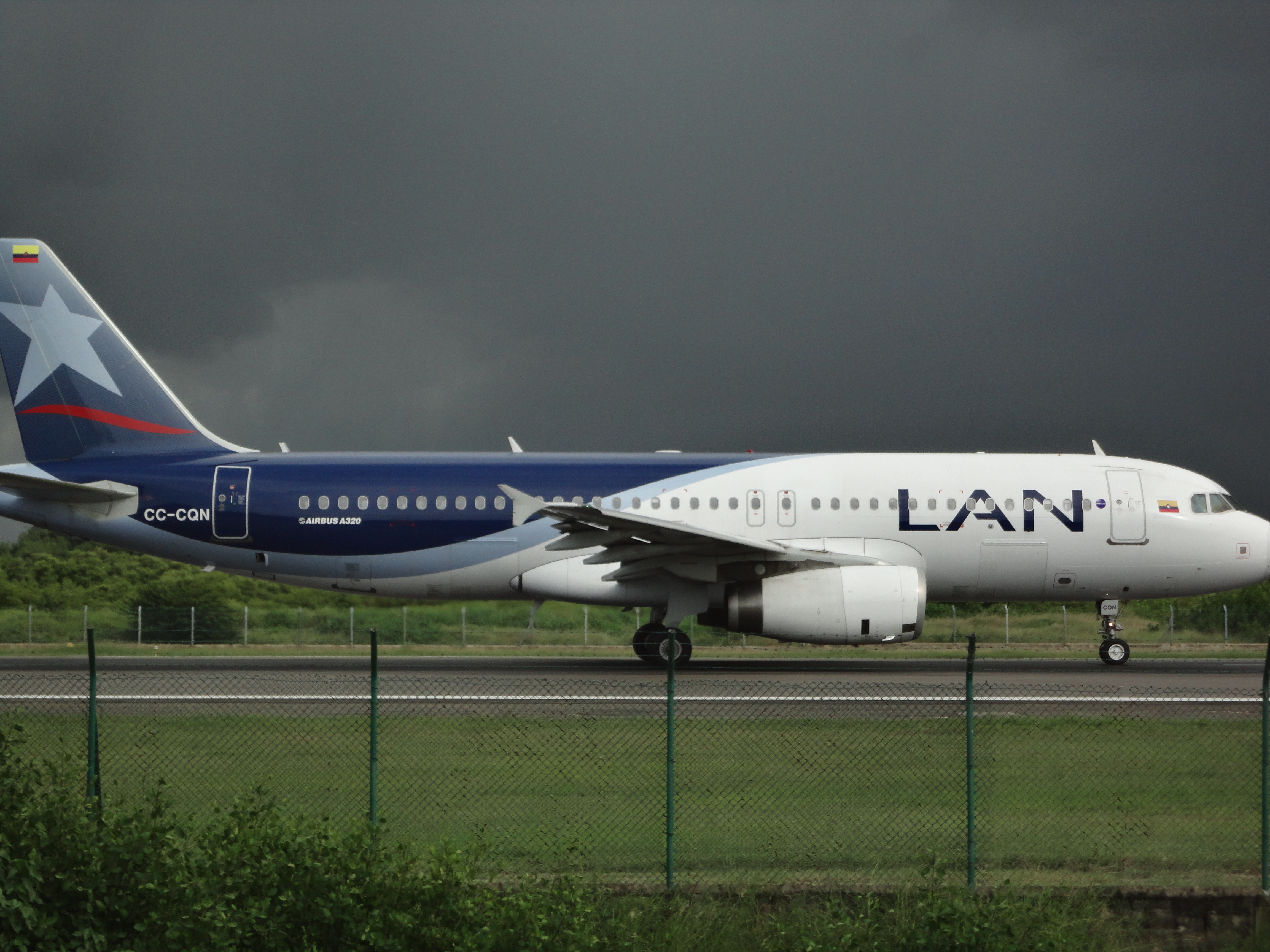 A-320